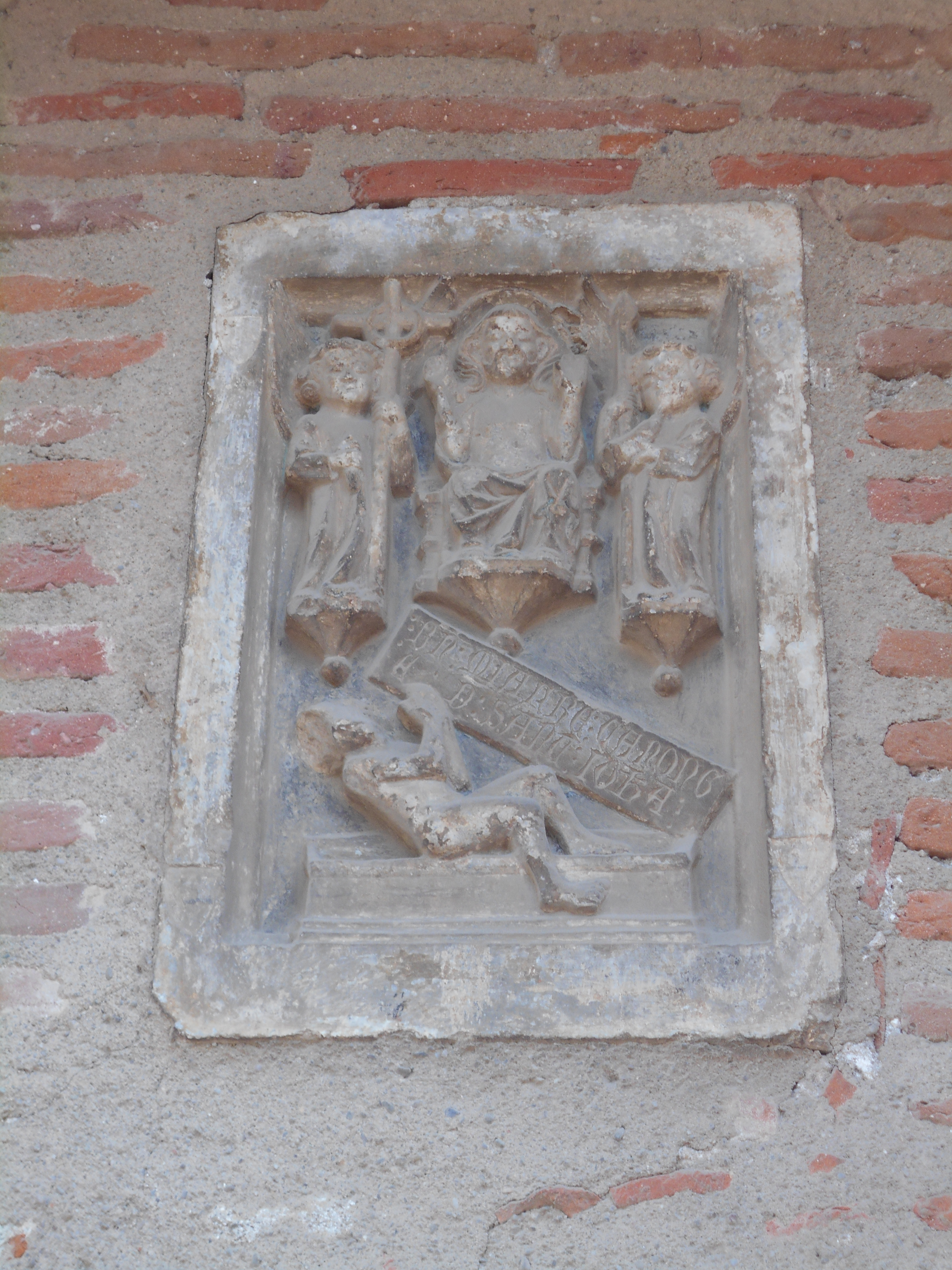 El Campo Santo de Perpinyà.